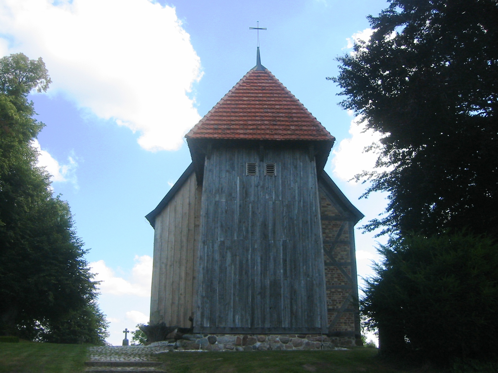 Dorfkirche Kloster Wulfshagen in Marlow: Turm